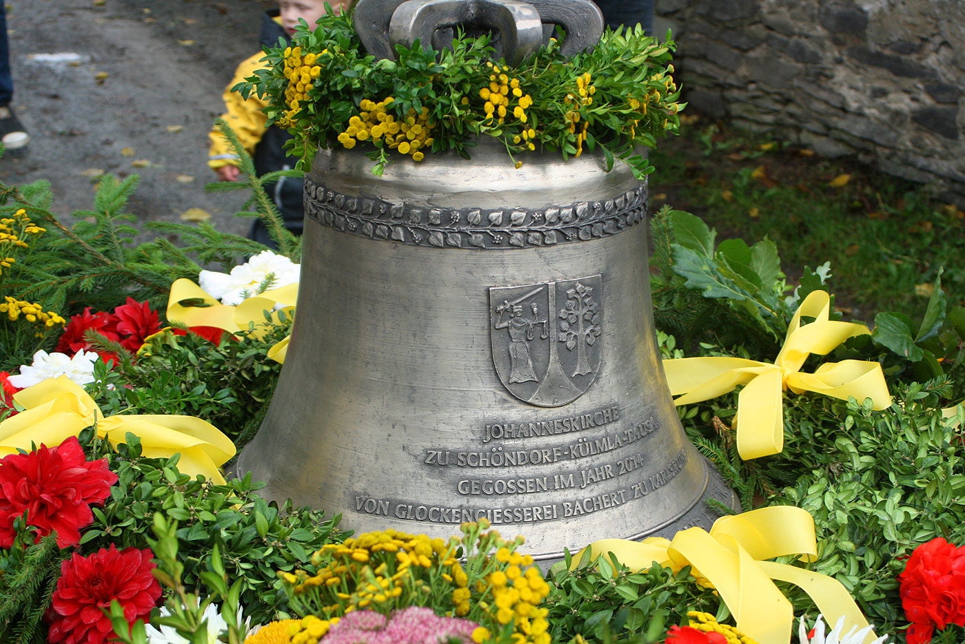 Glocke der Dreieinigkeit der Johanneskirche Schöndorf bei Schleiz, gegossen 2014 in Karlsruhe